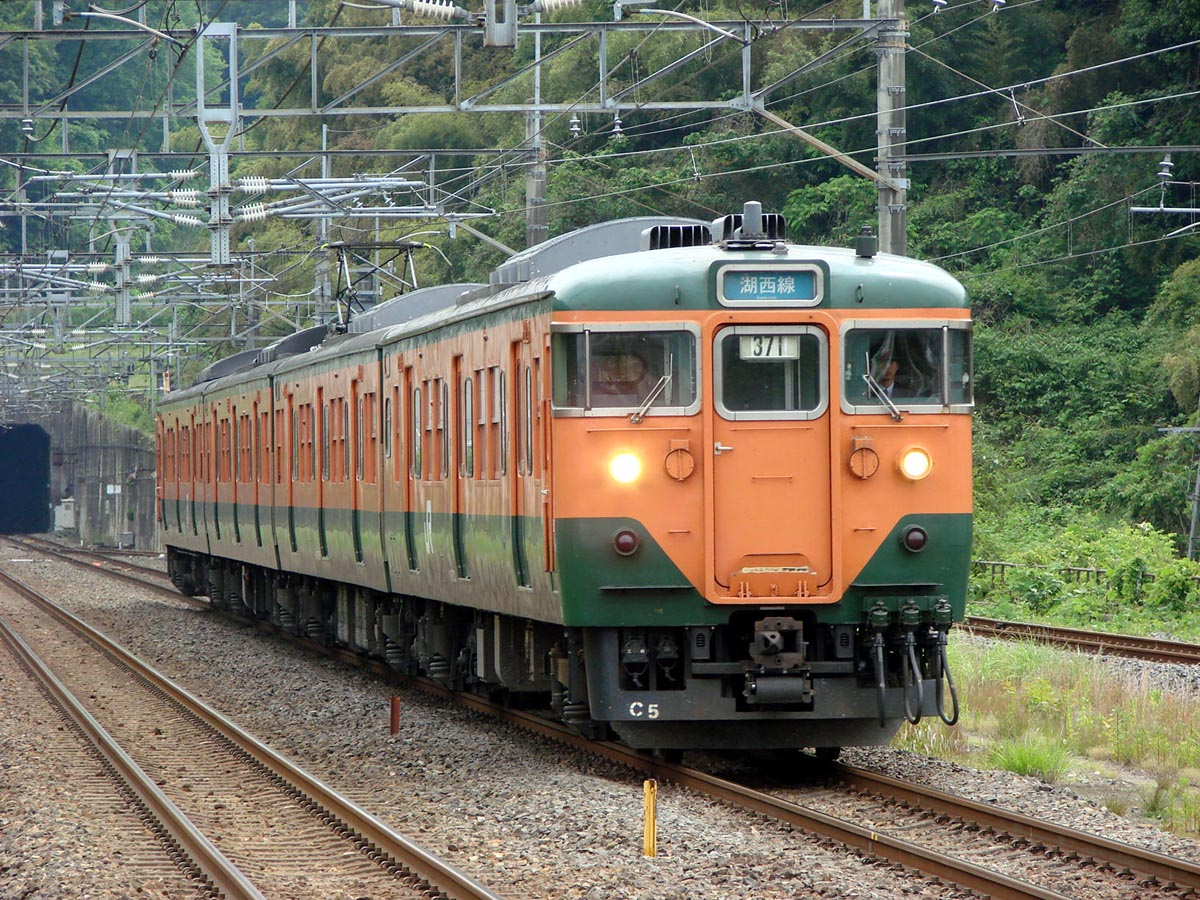 JR西日本 113系